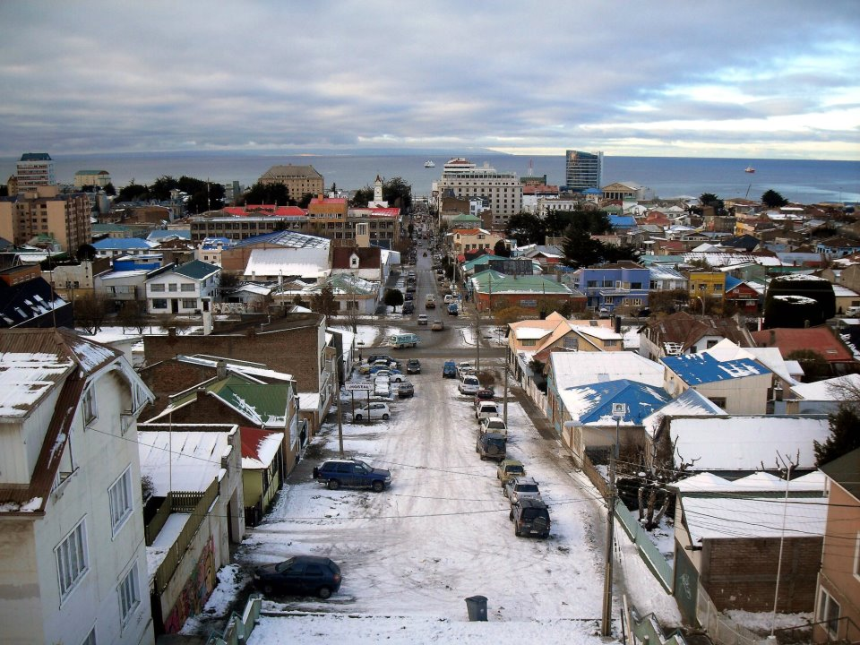 Punta Arenas en invierno .